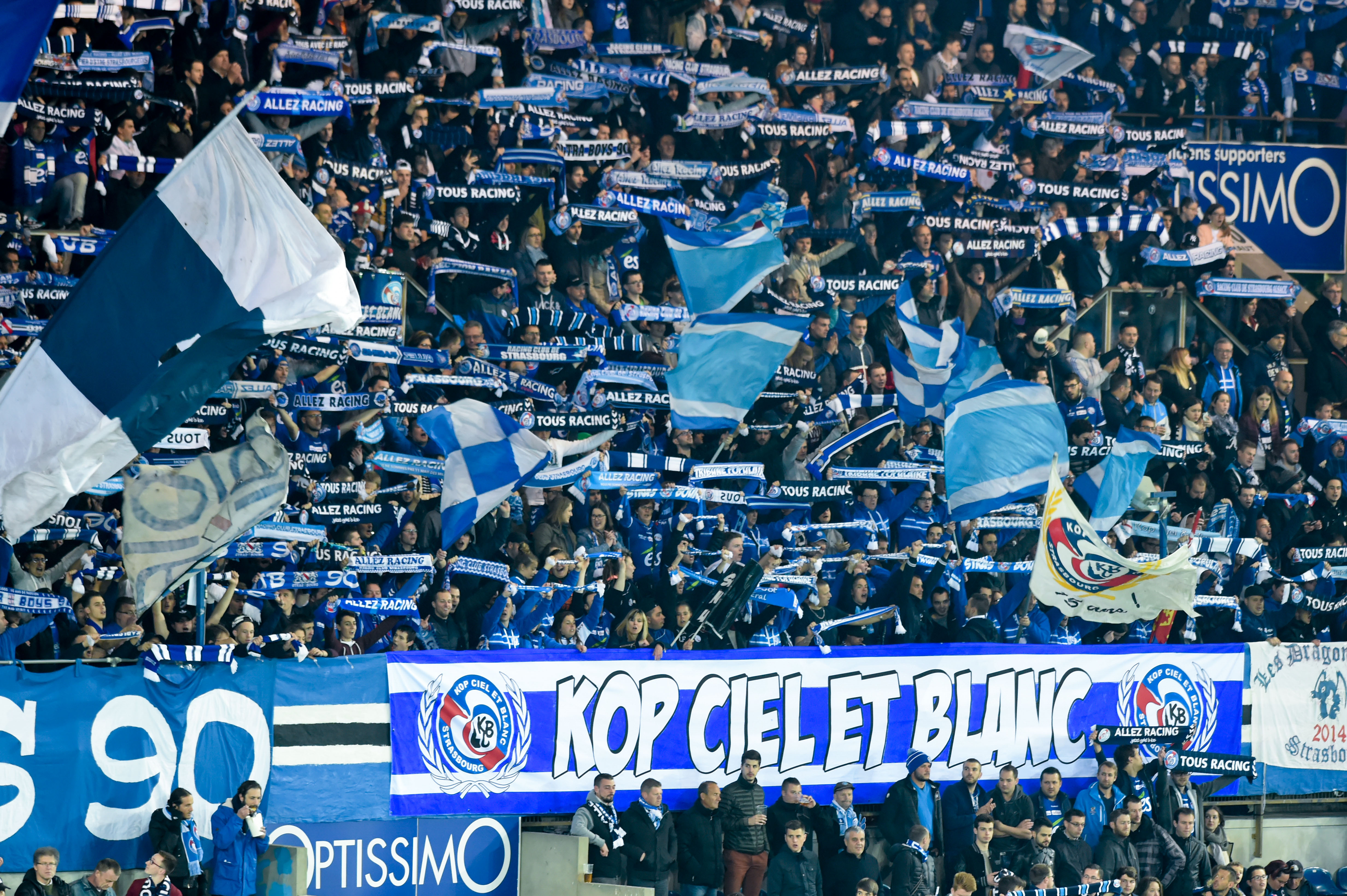 tifo et kop RCSA Racing Club de Strasbourg Alsace au stade de la Meinau. photo Franck KOBI / Haguenau port 06.81.38.09.98 Kop ciel et blanc